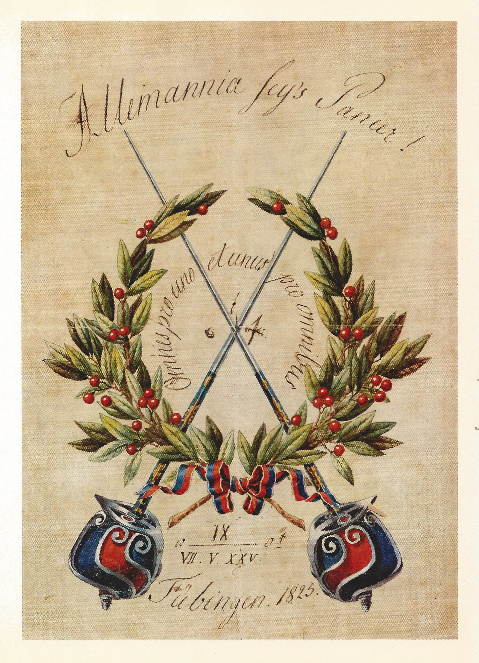 Studentenwappen des Corps Allemannia Tübingen